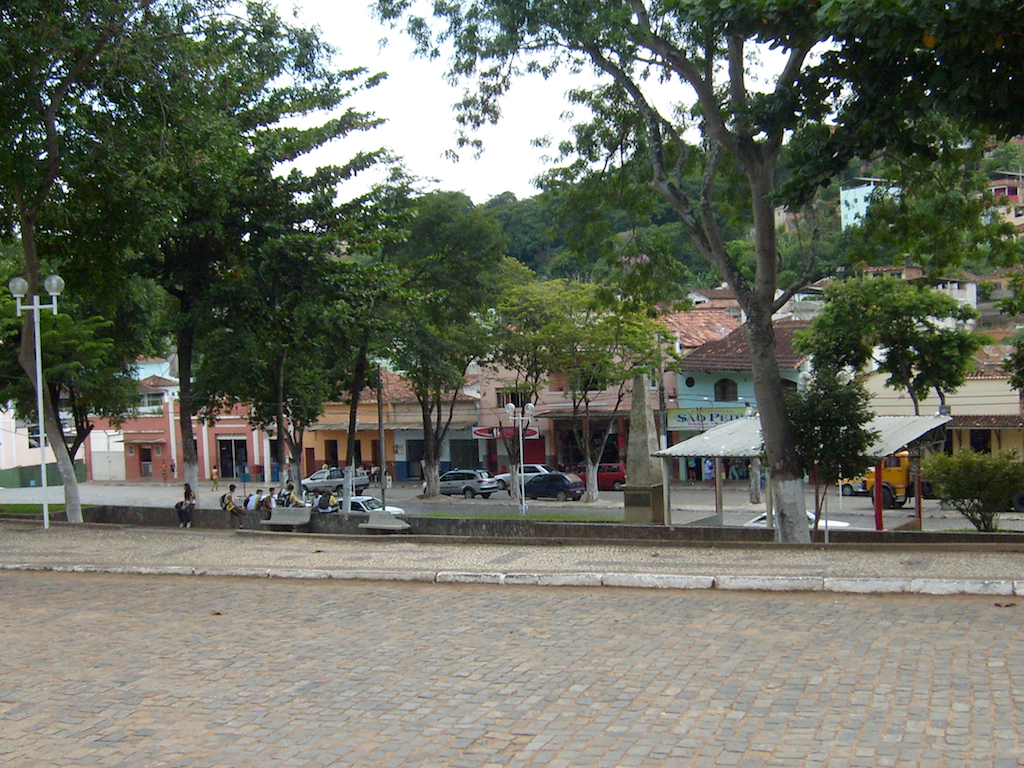 São Pedro dos Ferros, Minas Gerais, Brasil